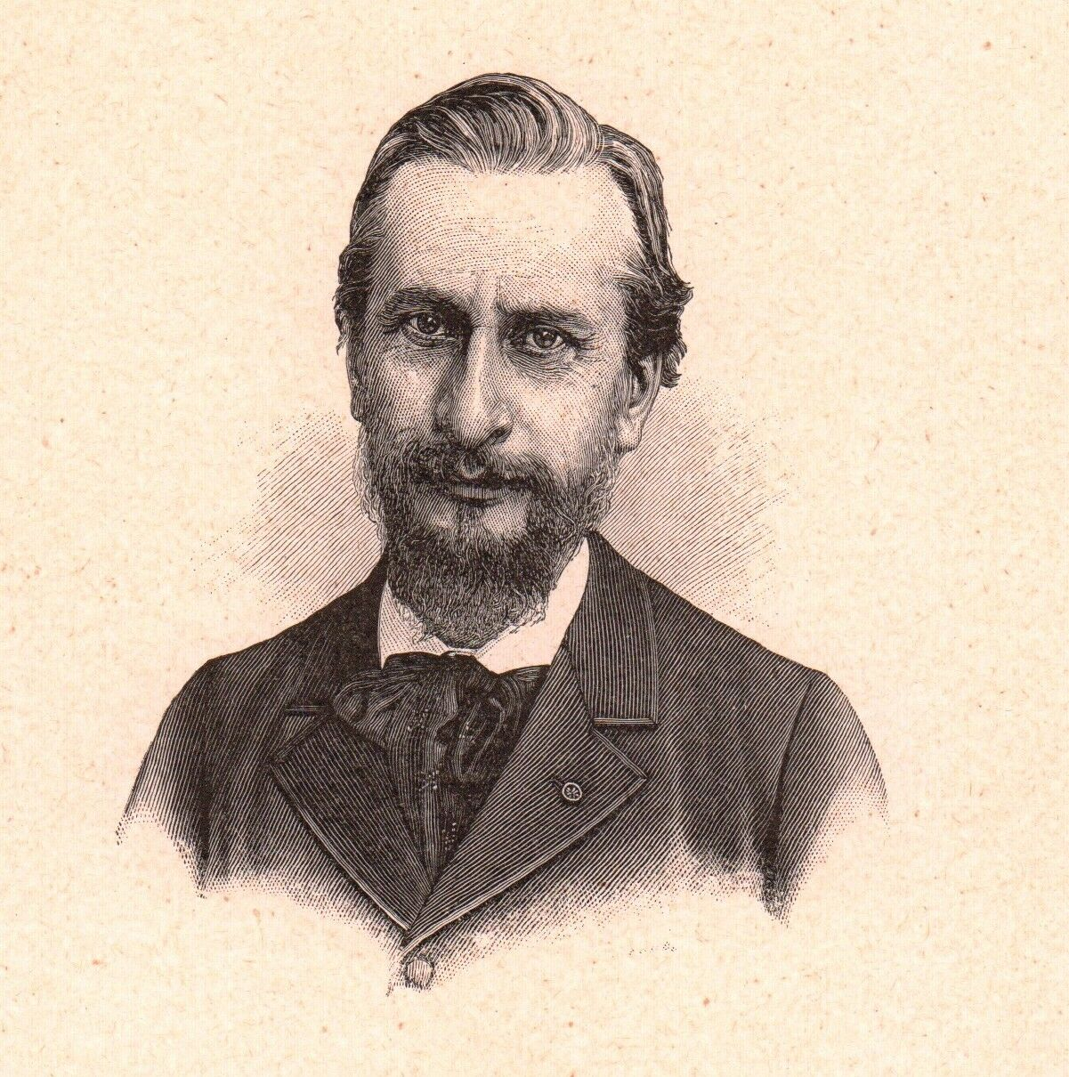 French politician Émile Flourens (1841-1920)